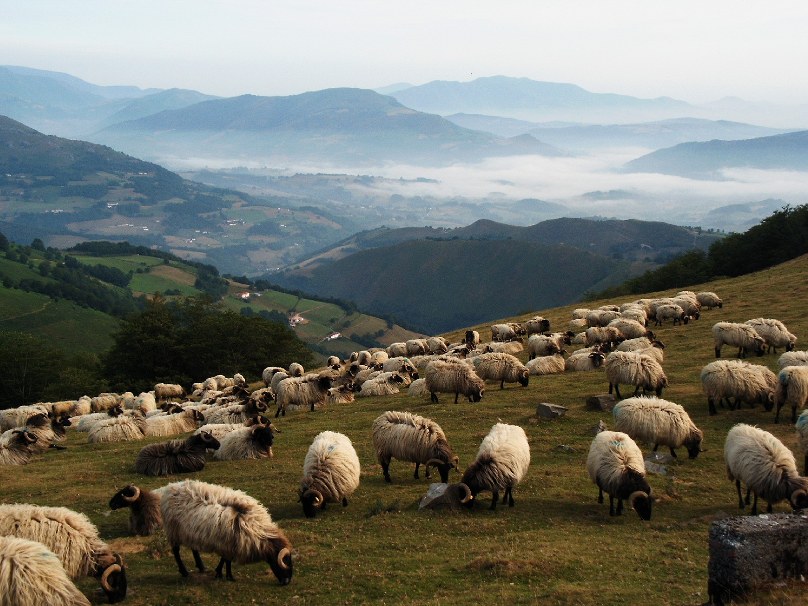 Taken in Arnéguy, Pyrénées-Atlantiques